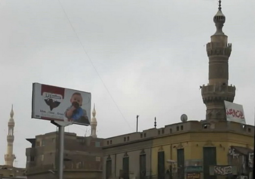 مسجد عز مسجد عز بمدينة طنطا